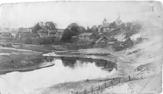 Беларуская (тарашкевіца): Бобр (Bobr), рака Бобр. Касьцёл і царква